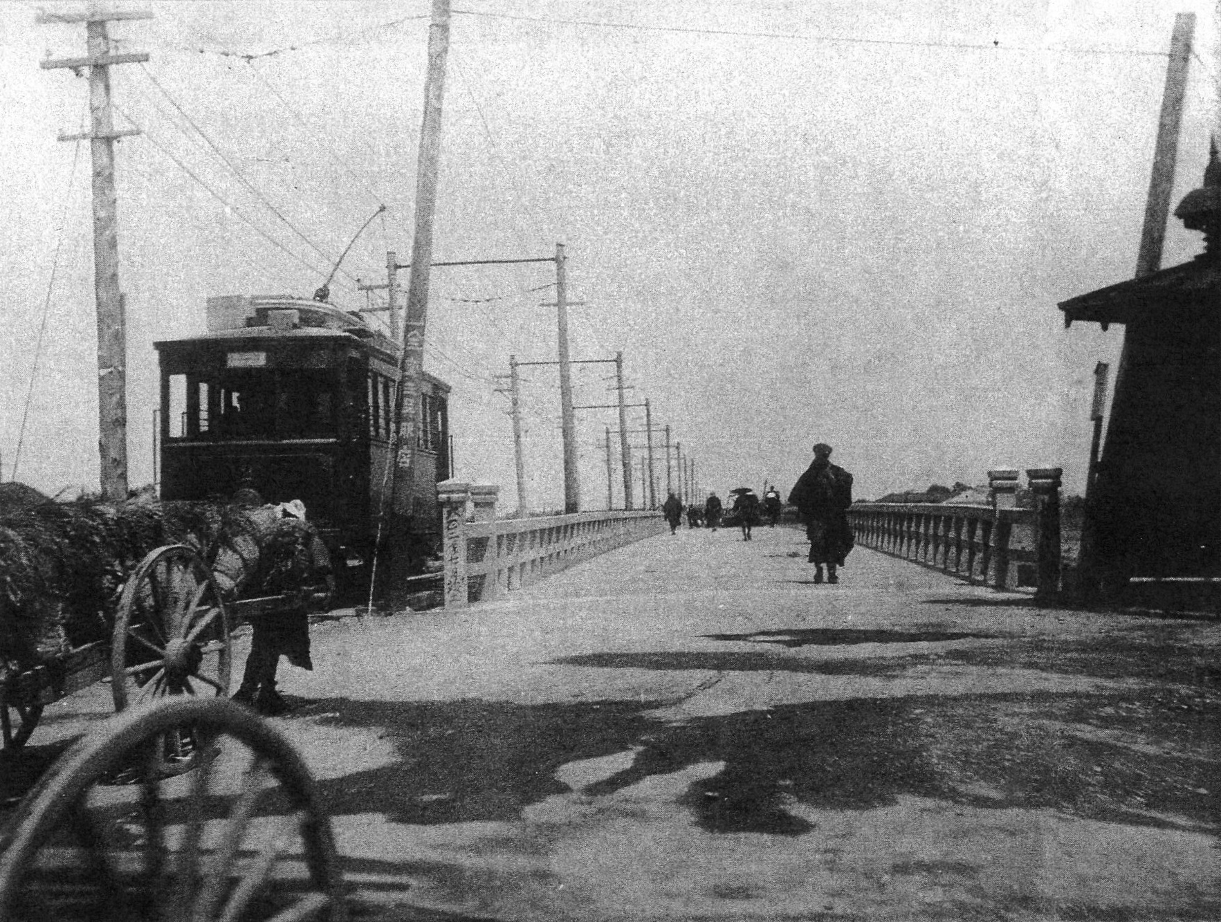 1913年（大正2年）頃の神通川旧河流を跨いでいた旧桜橋とその上を走行する富山電気軌道